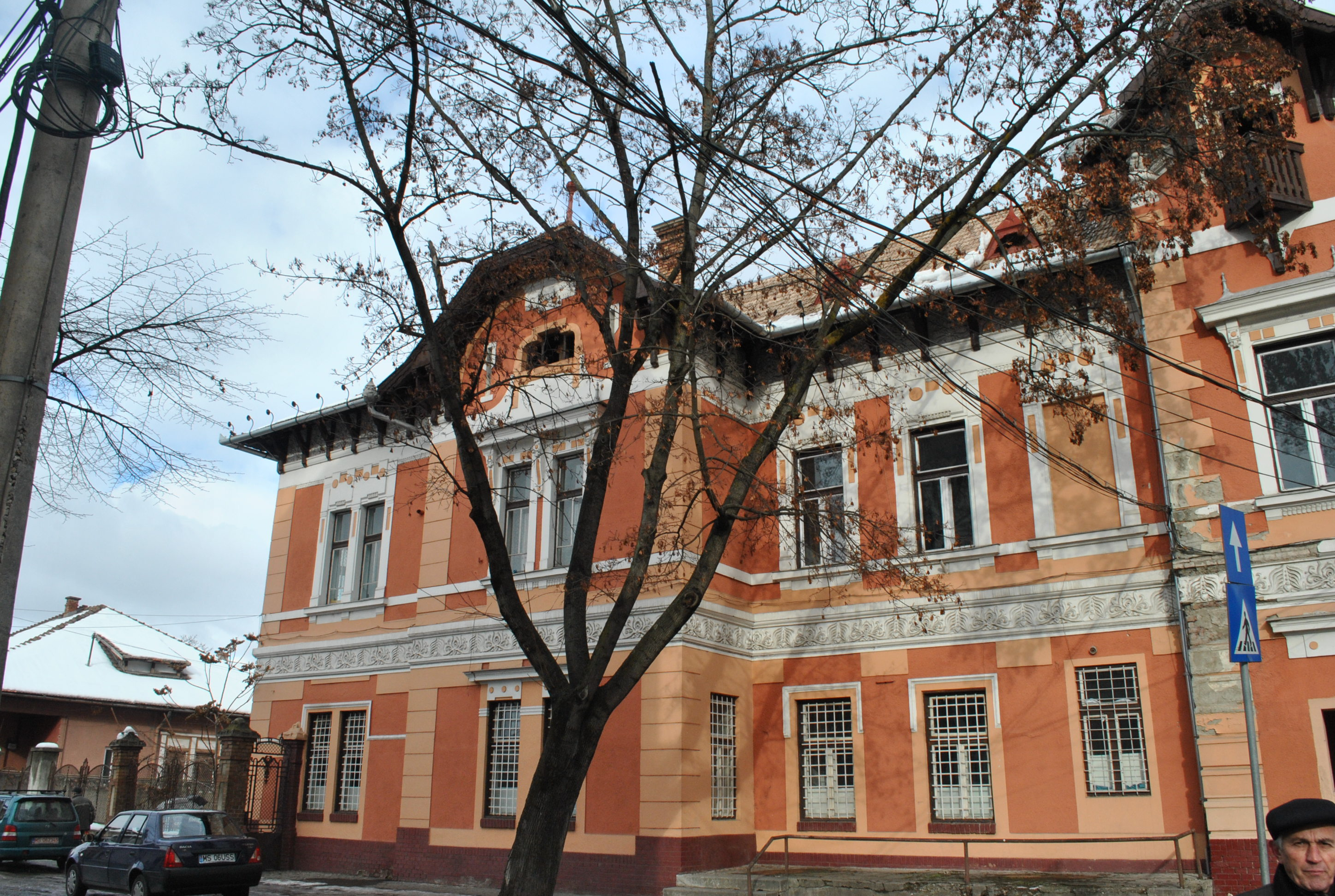 Casă, azi Sanepid, 1911